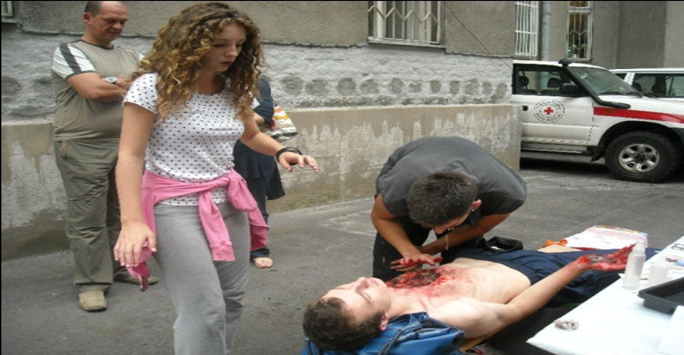 državno takmičenje